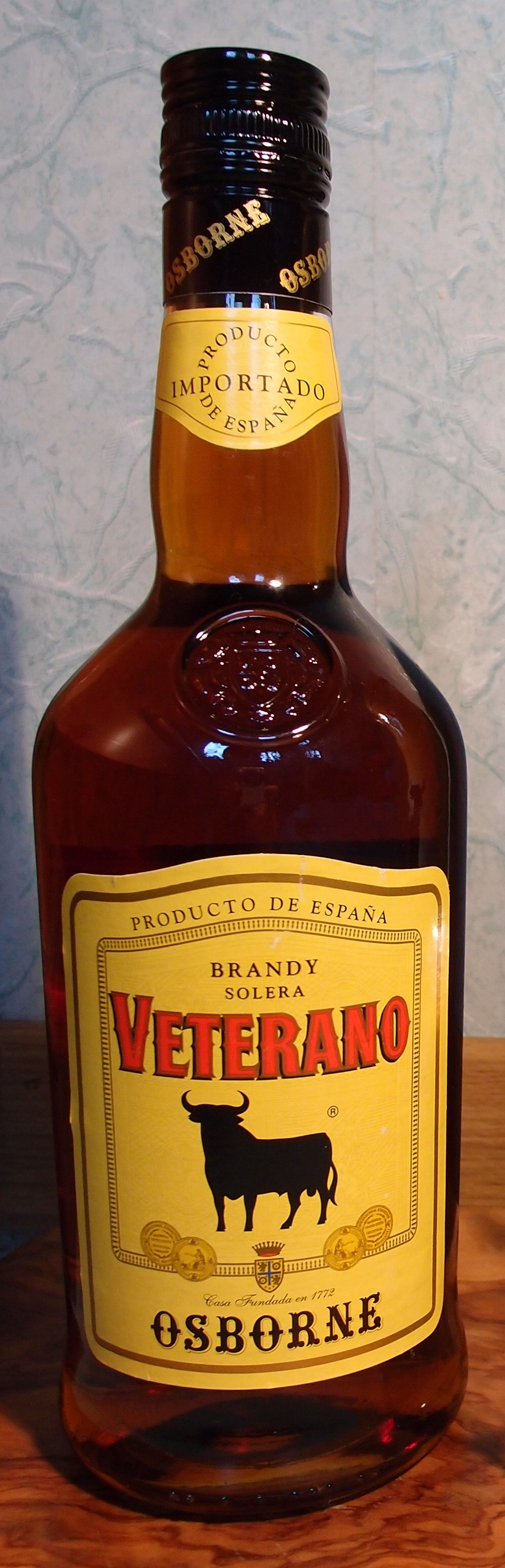 Osborne Veterano (Brandy, Solera) Datum: 12.08.2011 Urheber: M. Pfeiffer alias Benutzer:Gordito1869 Quelle: privates Fotoarchiv des Urhebers